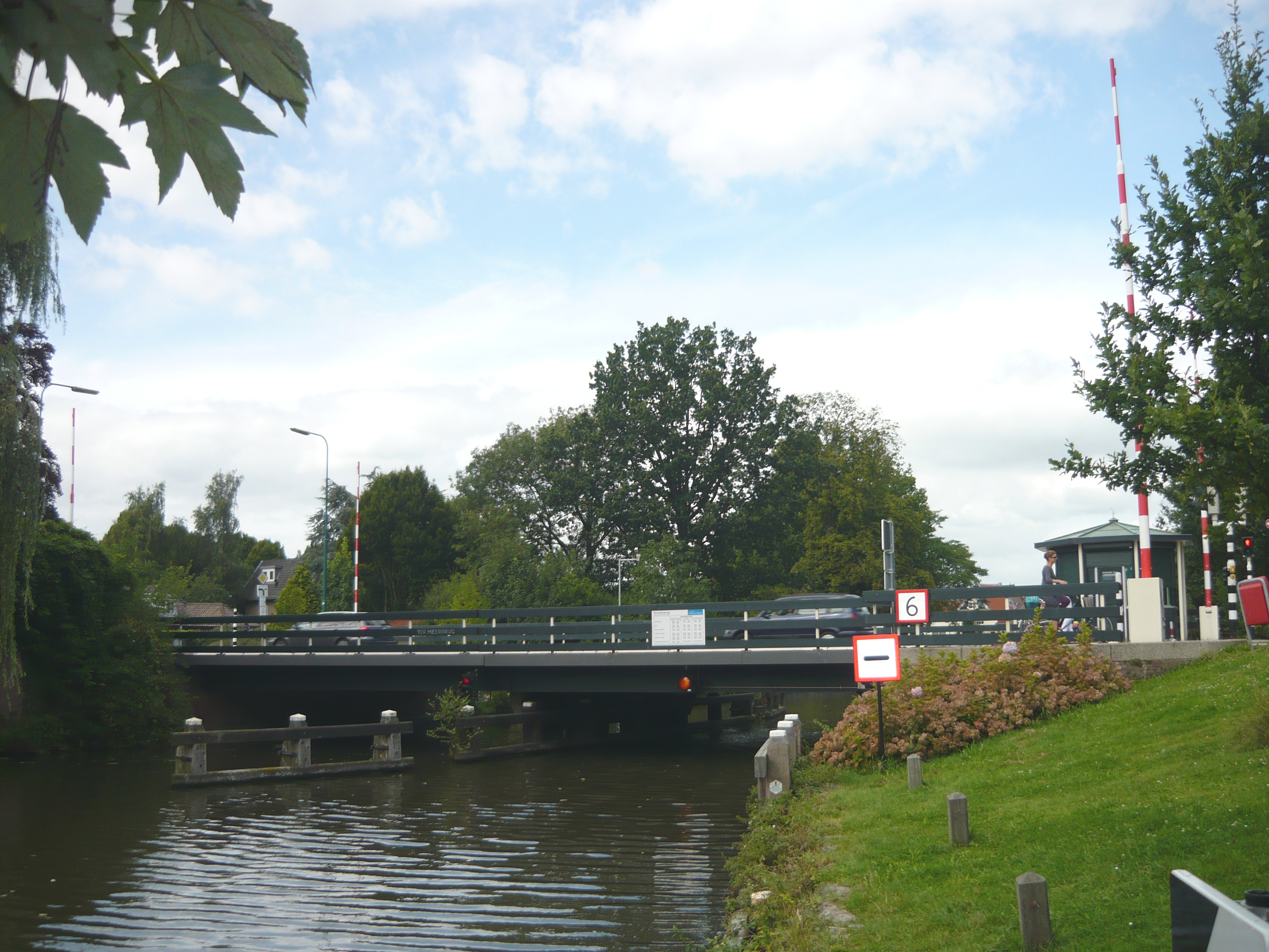 Termeerbrug over de Vecht in Maarssen